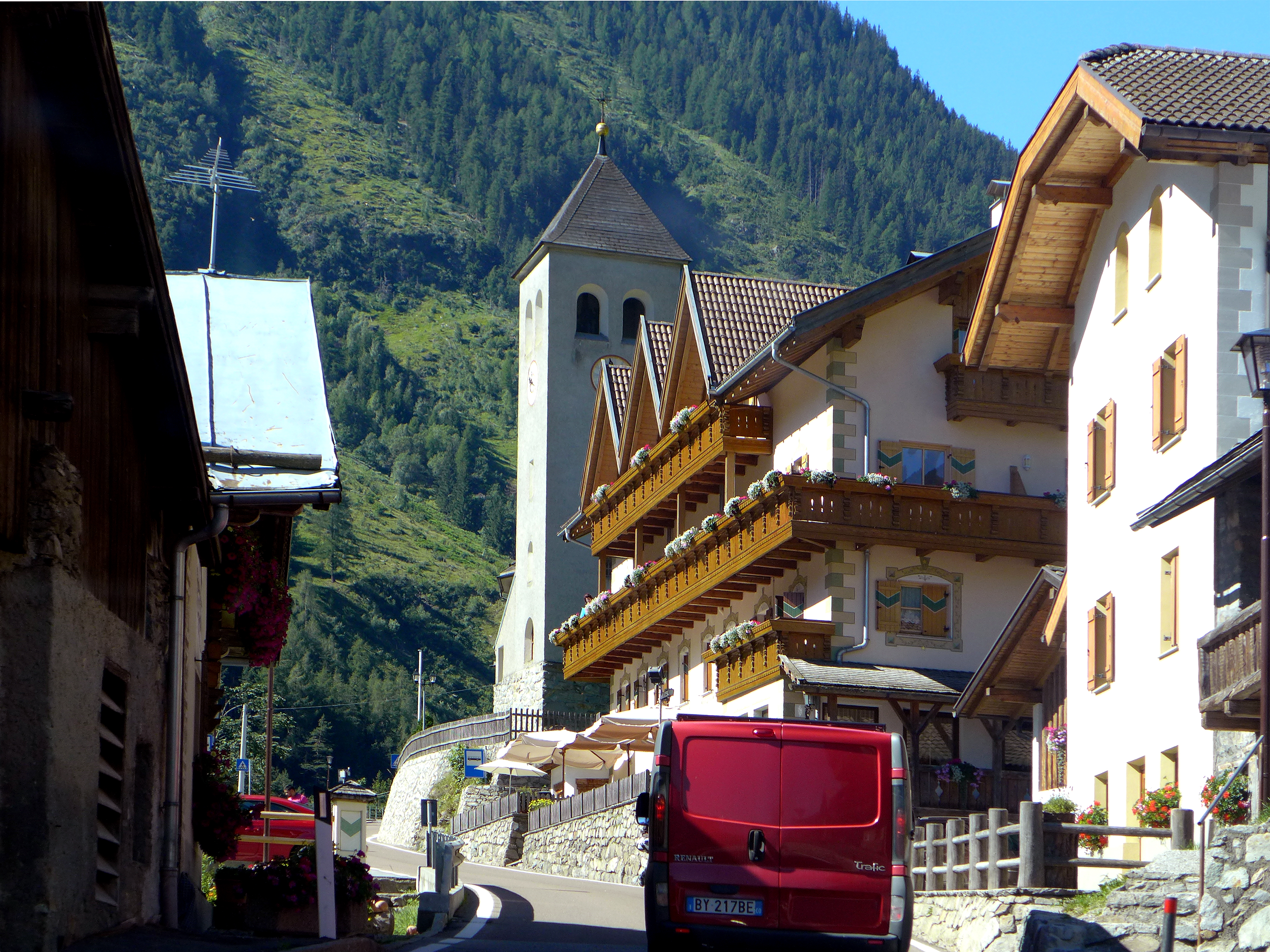 Út a Stelvio-hágóra (Prad am Stilfserjoch, Olaszország)